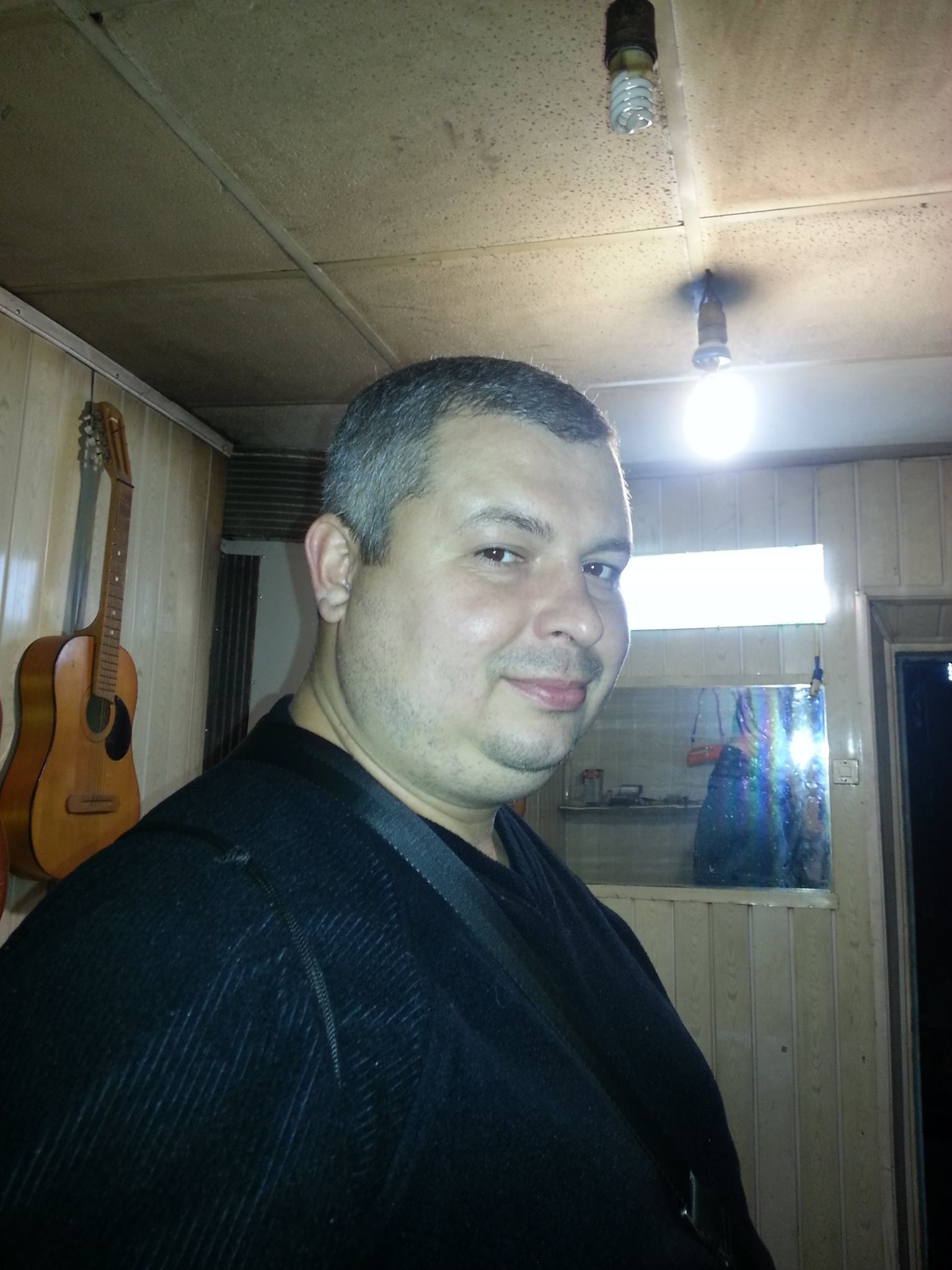 Олександр Шакілов